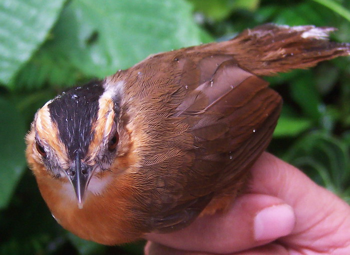 Pellorneum capistratum from Situgede, Bogor, West Java, Indonesia